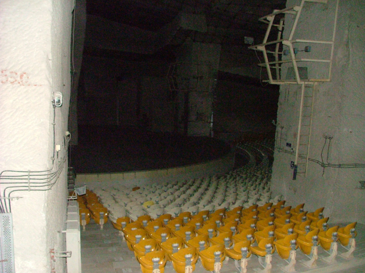 Fertőrákos, barlangszínház